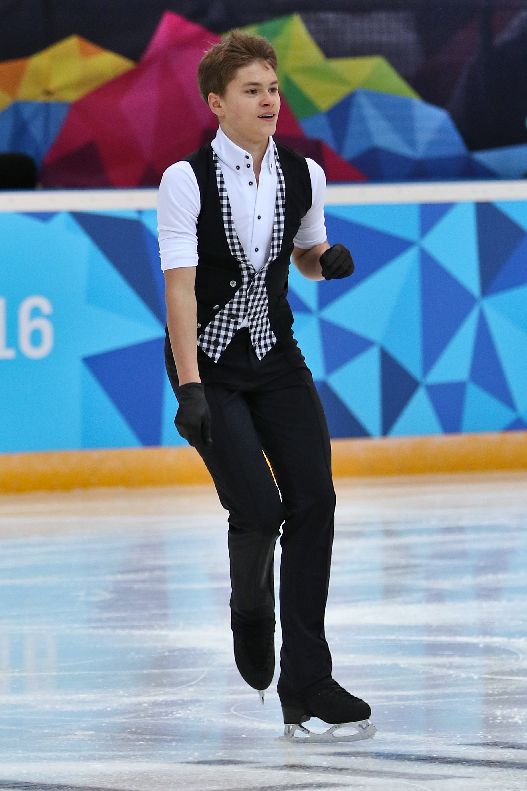 Lillehammer 2016 - Figure Skating Men Short Program - Deniss Vasiljevs